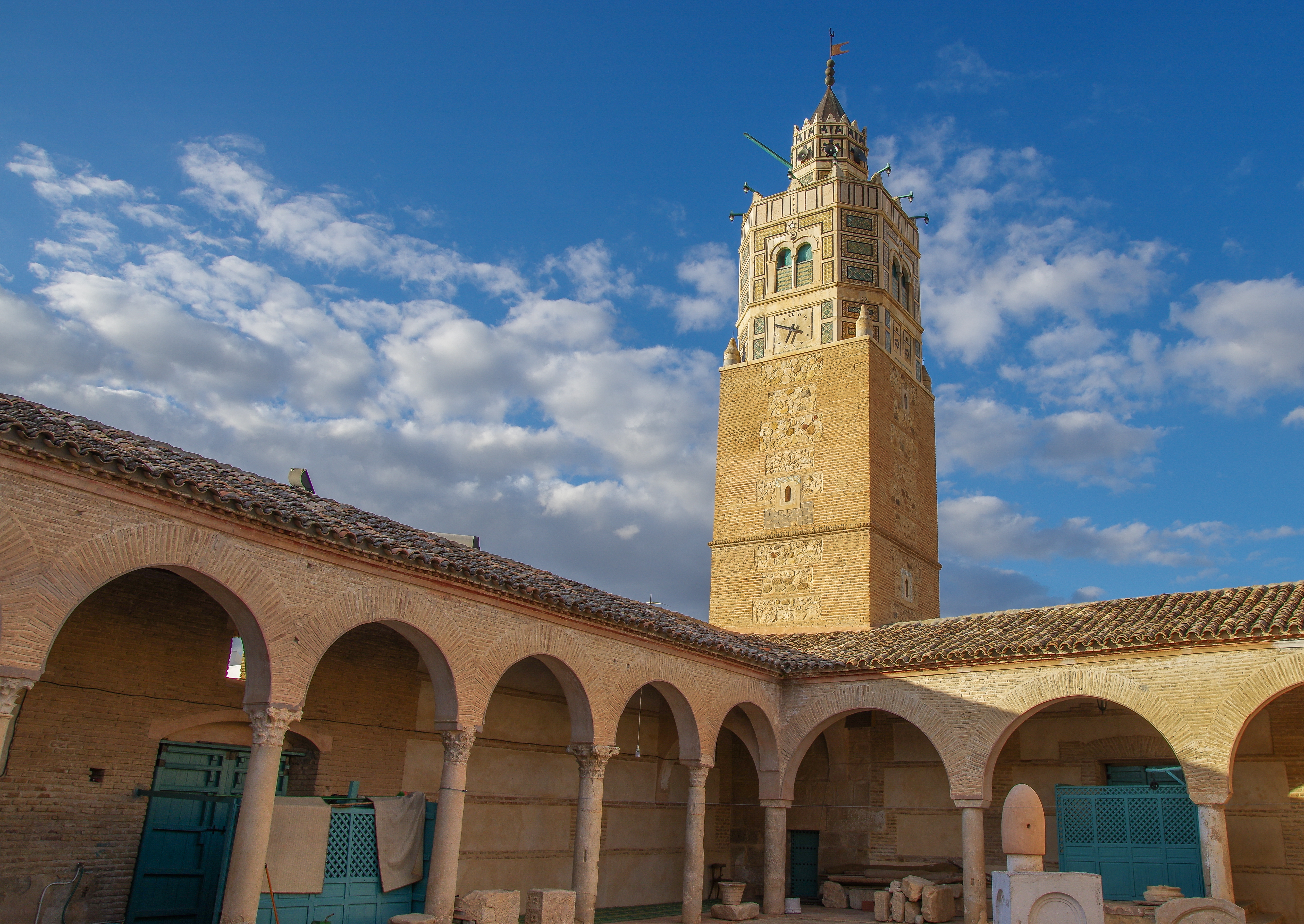 Grande mosquée